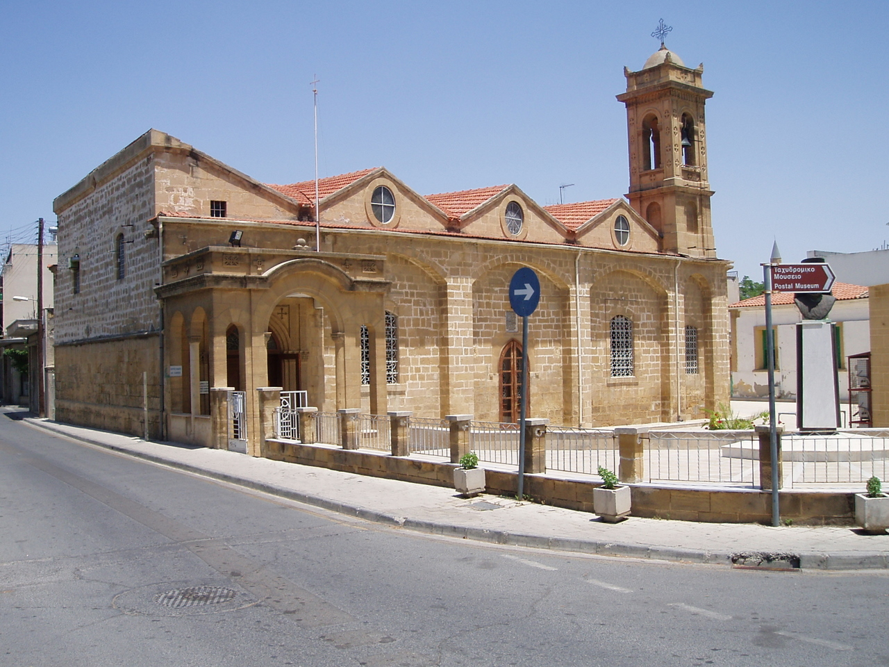 Agios Savvas Church, Nicosia